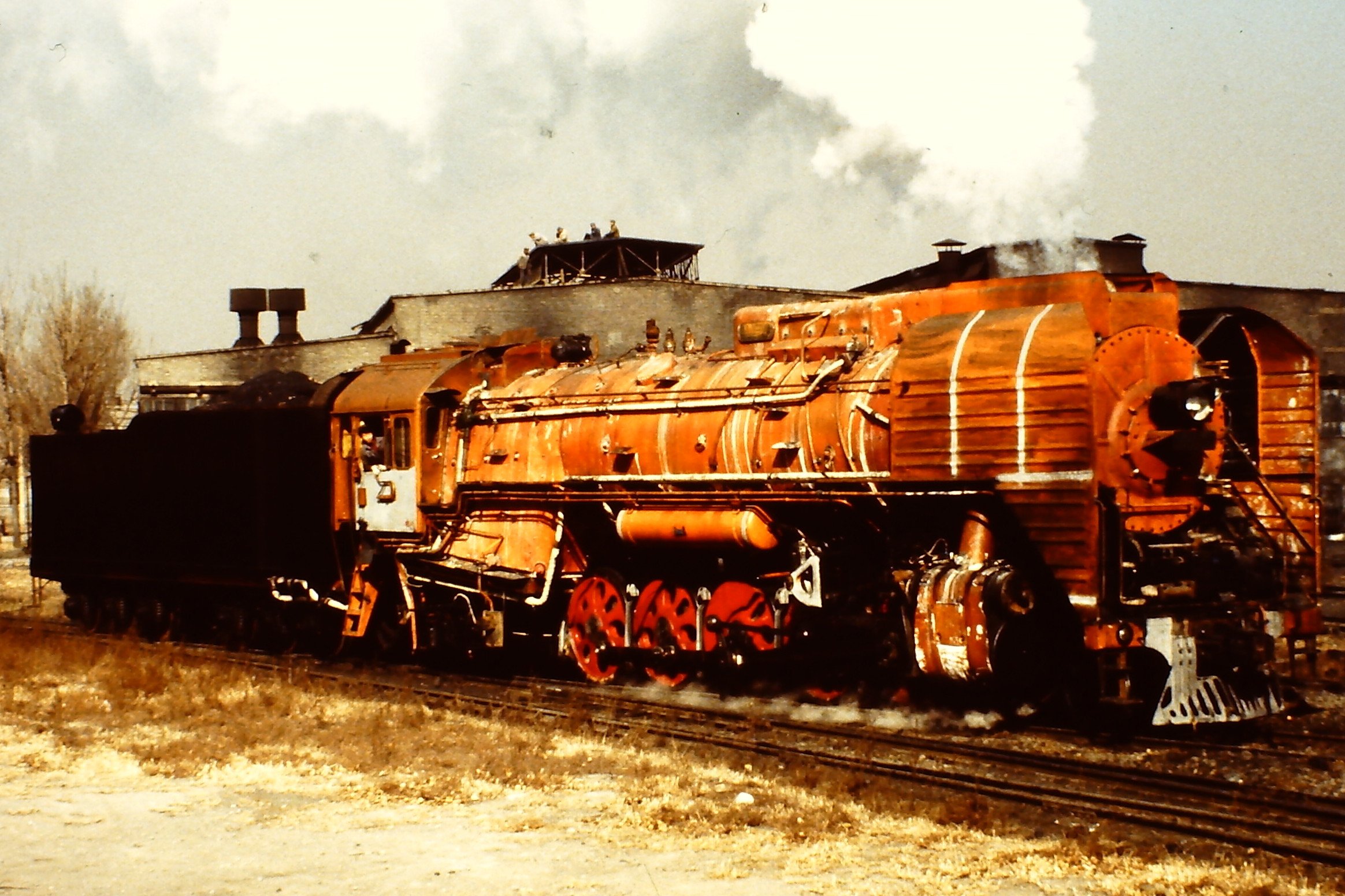 Probefahrt einer QJ im Werksgelände der Lokomotivfabrik Datong